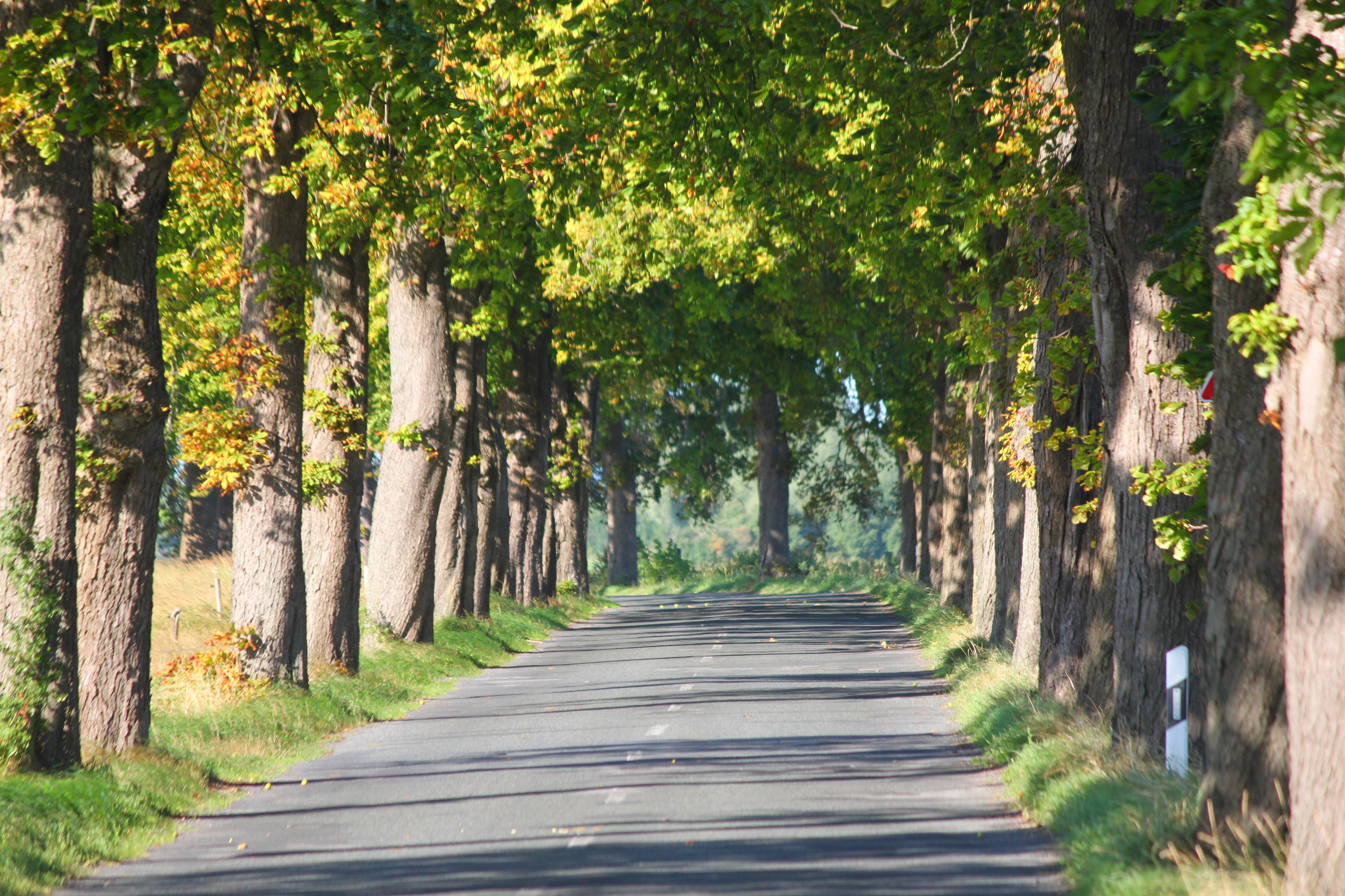 Allee zwischen Rankwitz und Liepe beim Jungfernberg